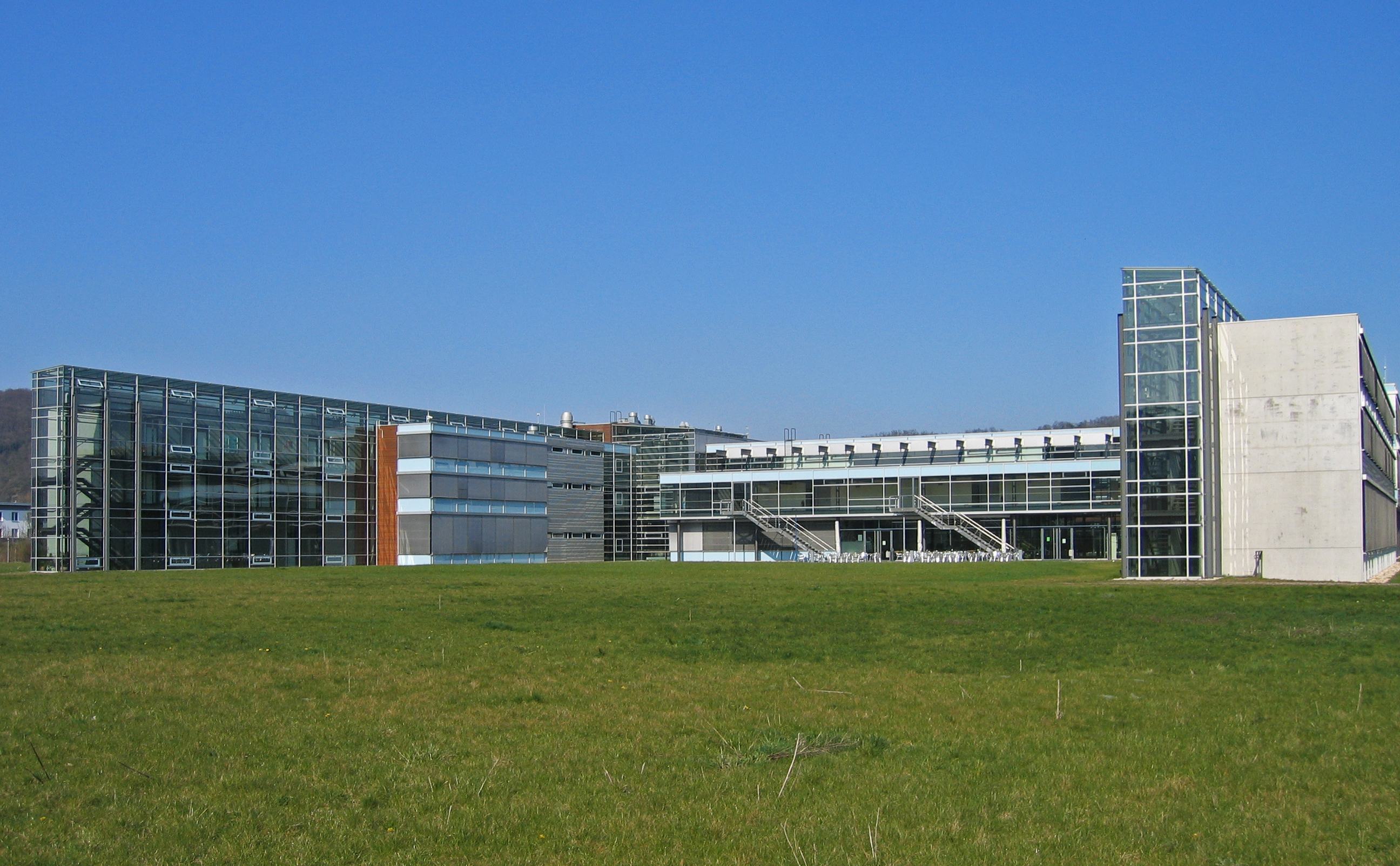 RheinAhrCampus Remagen